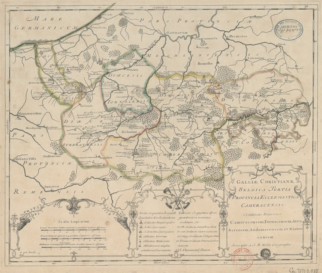 Carte de l'ancienne province ecclésiastique de Cambrai, insérée dans la Gallia Christiana (1715/1759).